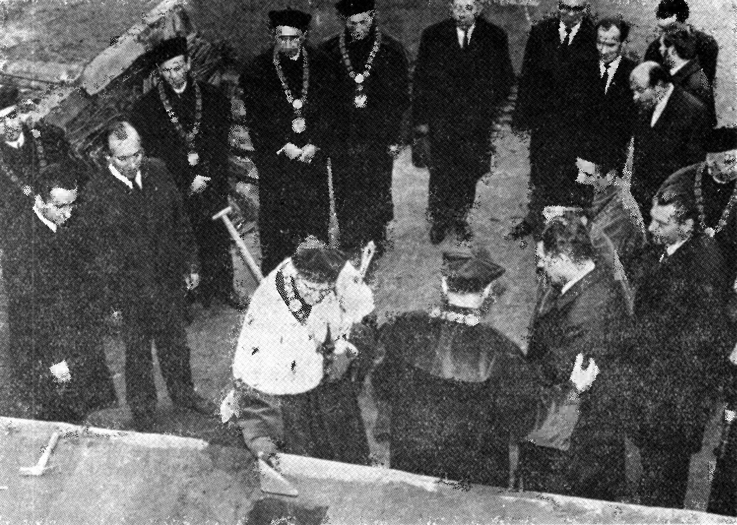 opis oryginalny: Uroczystość wmurowania aktu erekcyjnego pod budowę Collegium Maximum Wyższej Szkoły Rolniczej (29 października 1968 r.) przy ul. Wojska Polskiego 28. Na zdjęciu rektor Wyższej Szkoły Rolniczej prof. dr Zbyszko Tuchołka wmurowuje akt erekcyjny